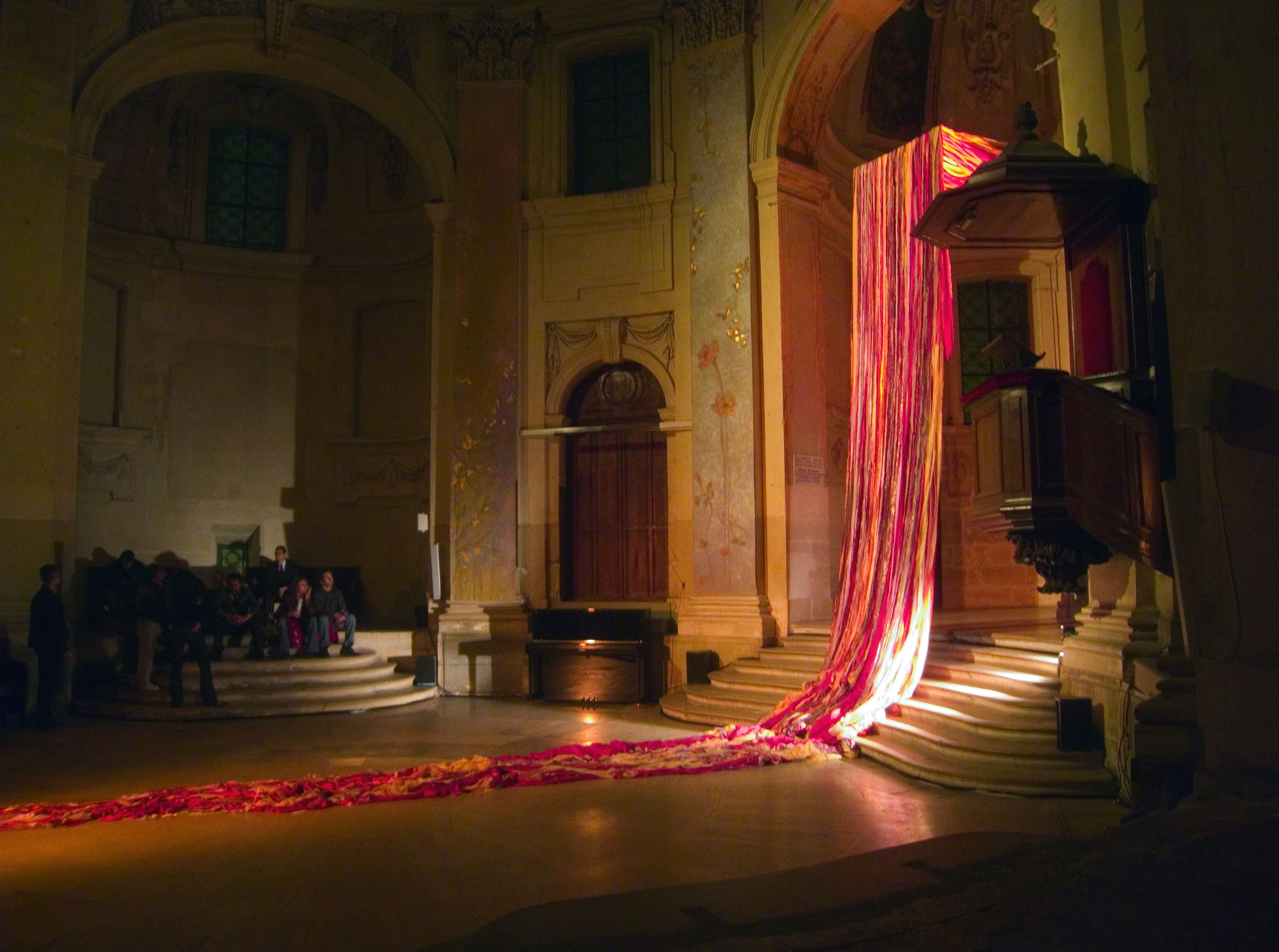 Traversée, Aurélie Flor-Jeanmaire. Temple du Marais Nuit Blanche 2010.